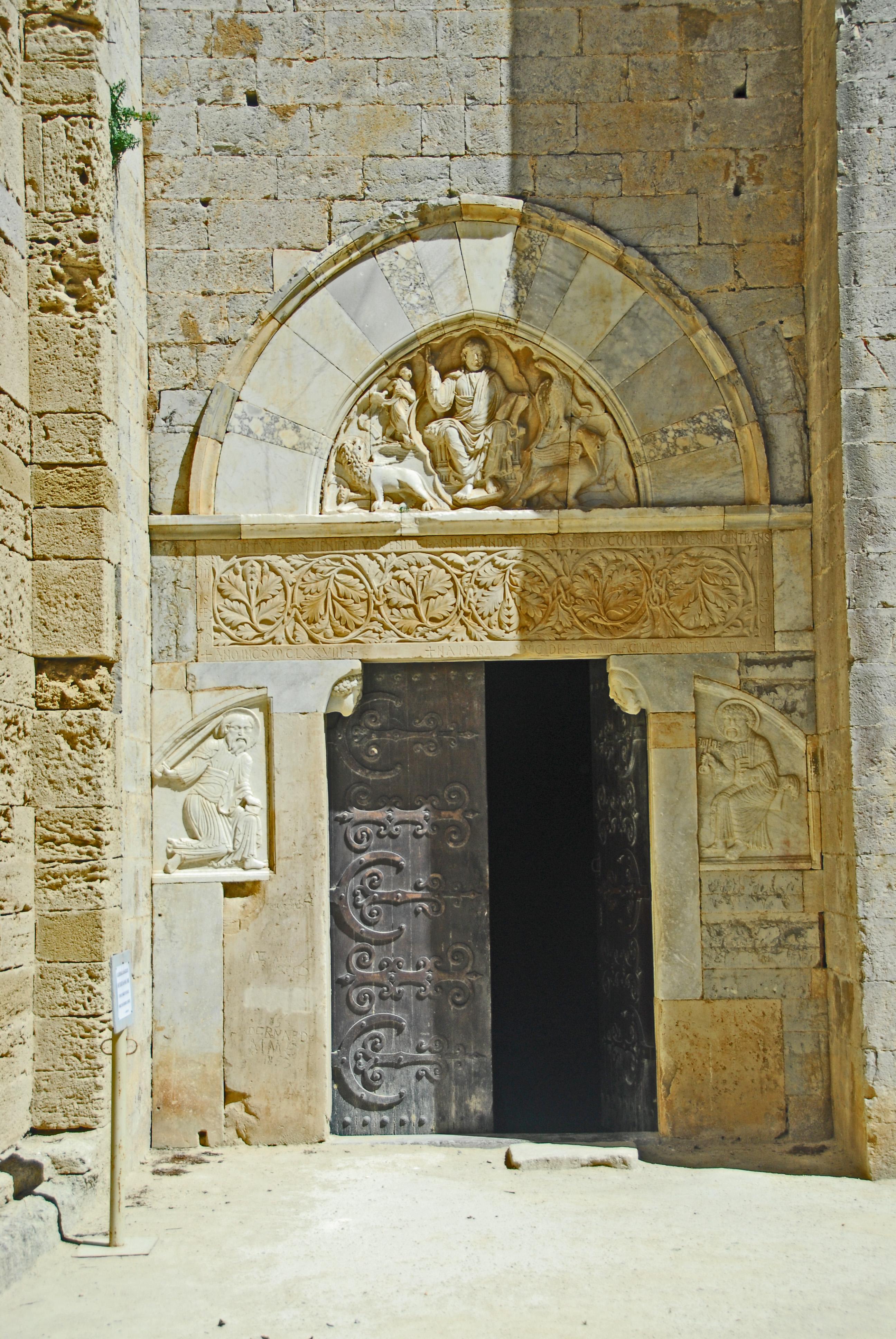 St-Pierre-et-St-Paul de Maguelone, Hauptportal von W